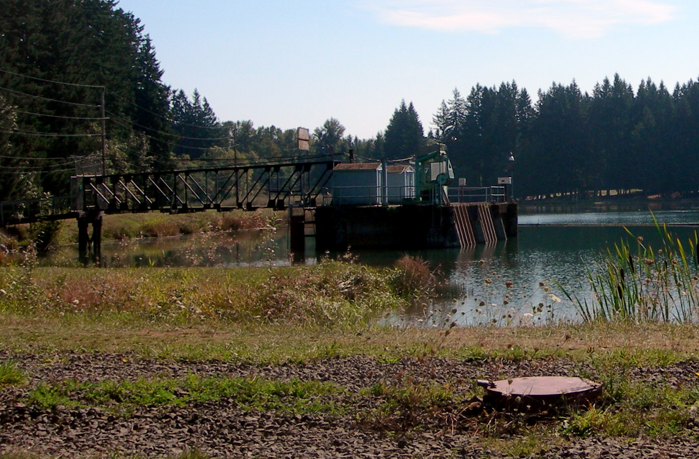 Penstock intake at Lake Roslyn (Oregon), a man-made lake